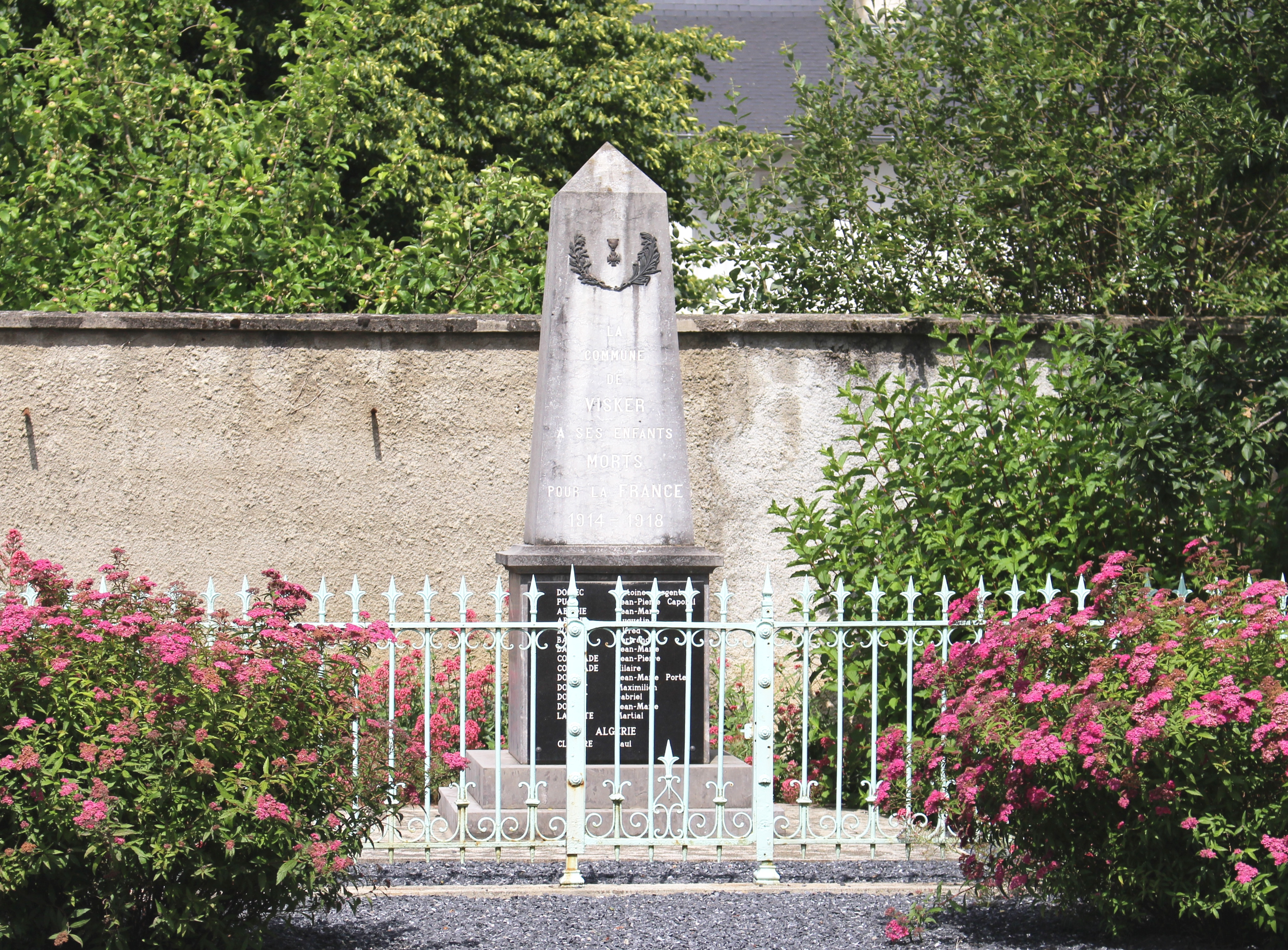 Monument aux morts de Visker (Hautes-Pyrénées)